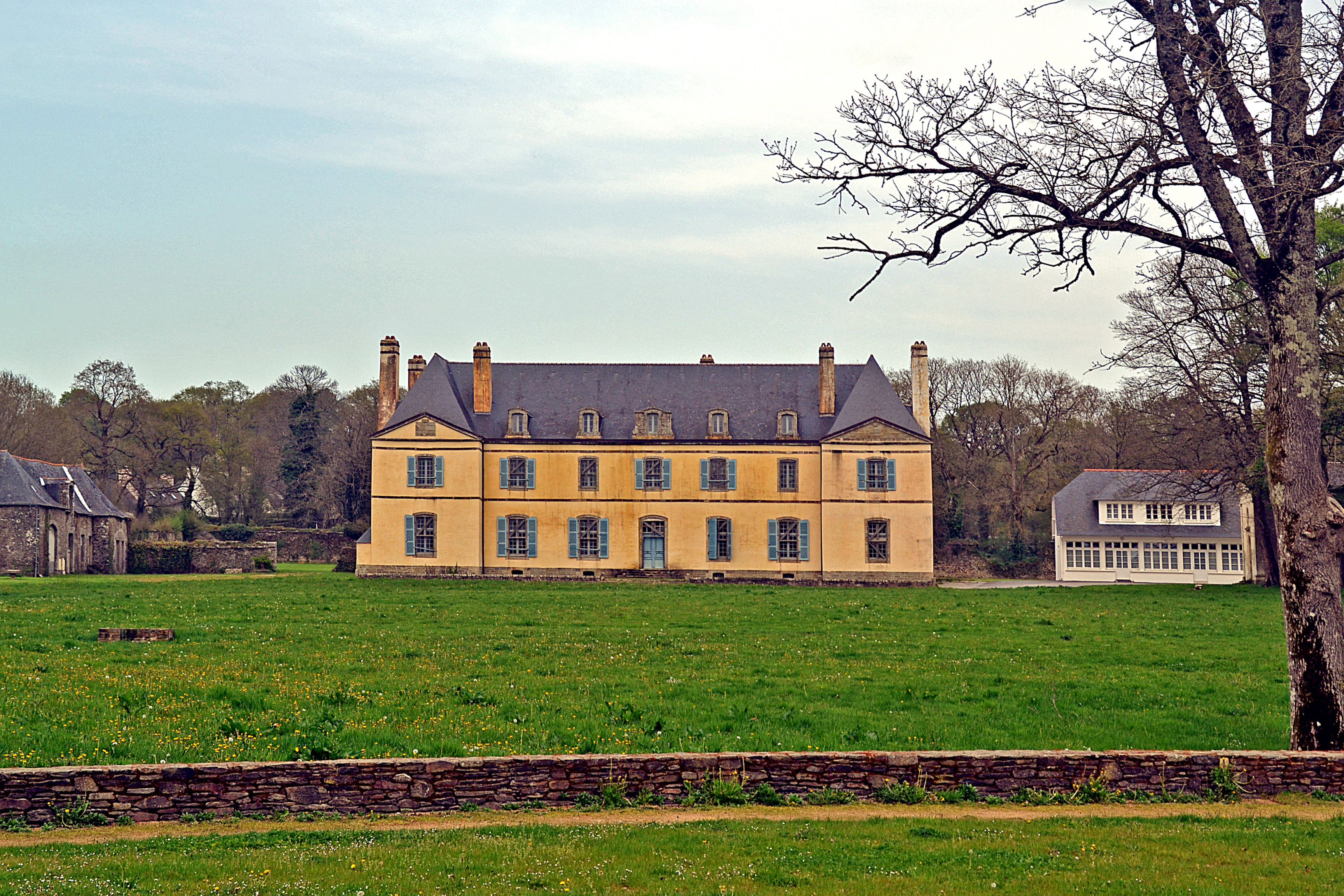 Château de Kerampuil à Carhaix-Plouguer.